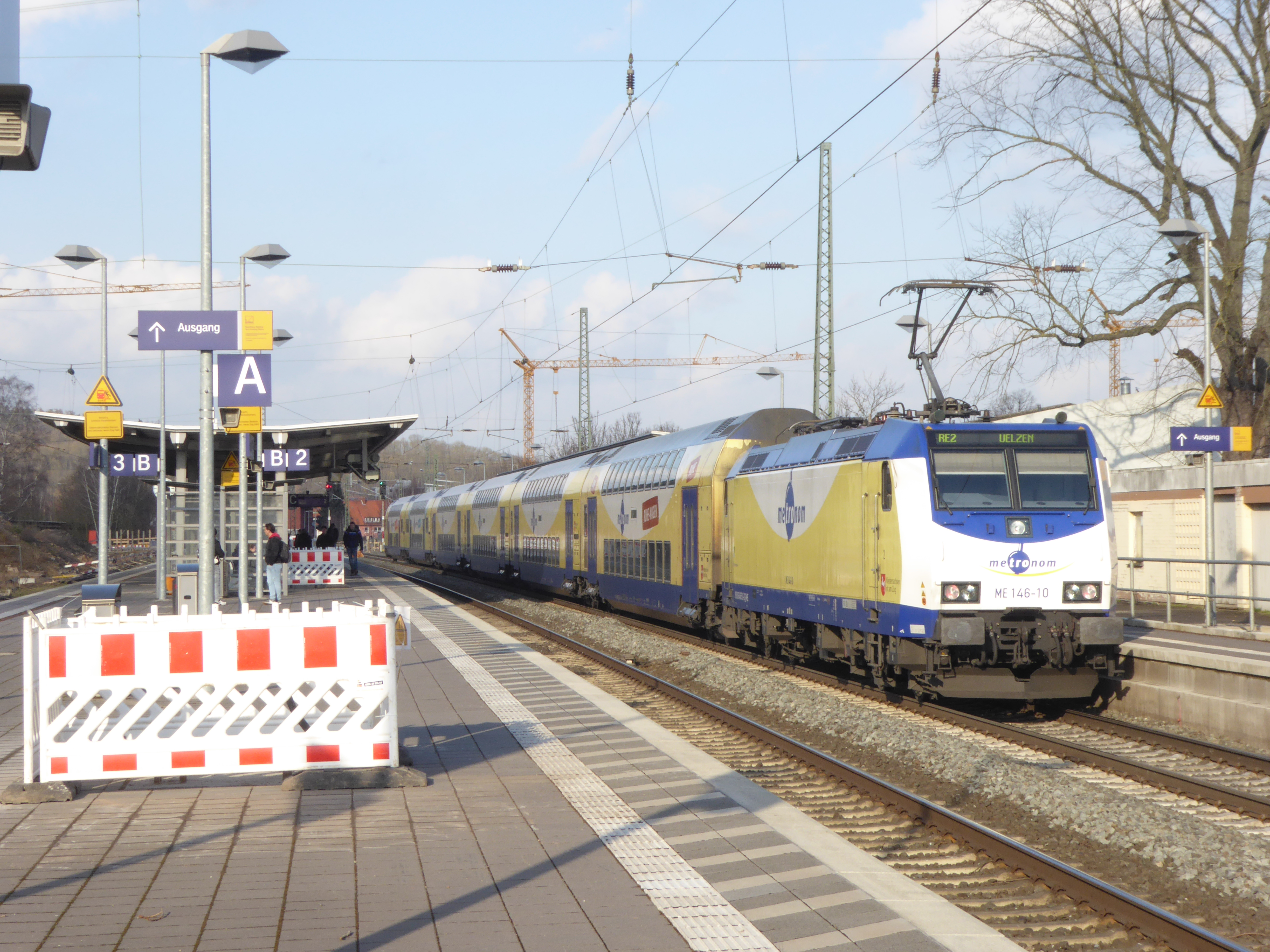 Ein Metronom nach Uelzen im Bahnhof Northeim, Westseite